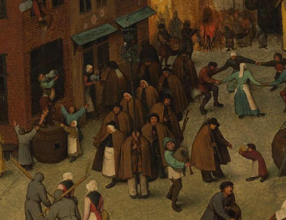 Detail van De strijd tussen Vasten en Vastenavond: gebruiken in januari-begin februari. Lichtmis, optocht van leprozen op Kloppermaandag, de koning drinkt, driekoningen.